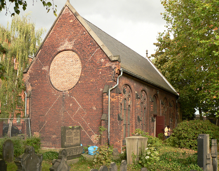 Friedhofshalle Jüdischer Friedhof Strangriede